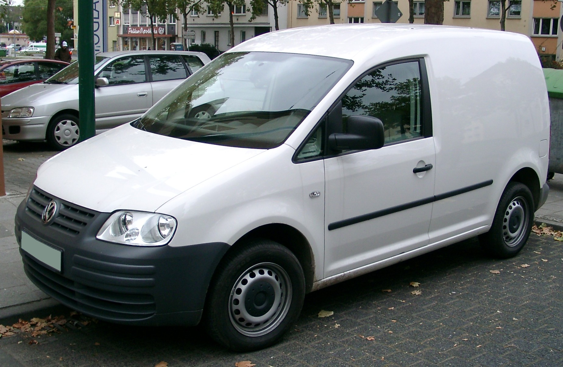 VW Caddy III